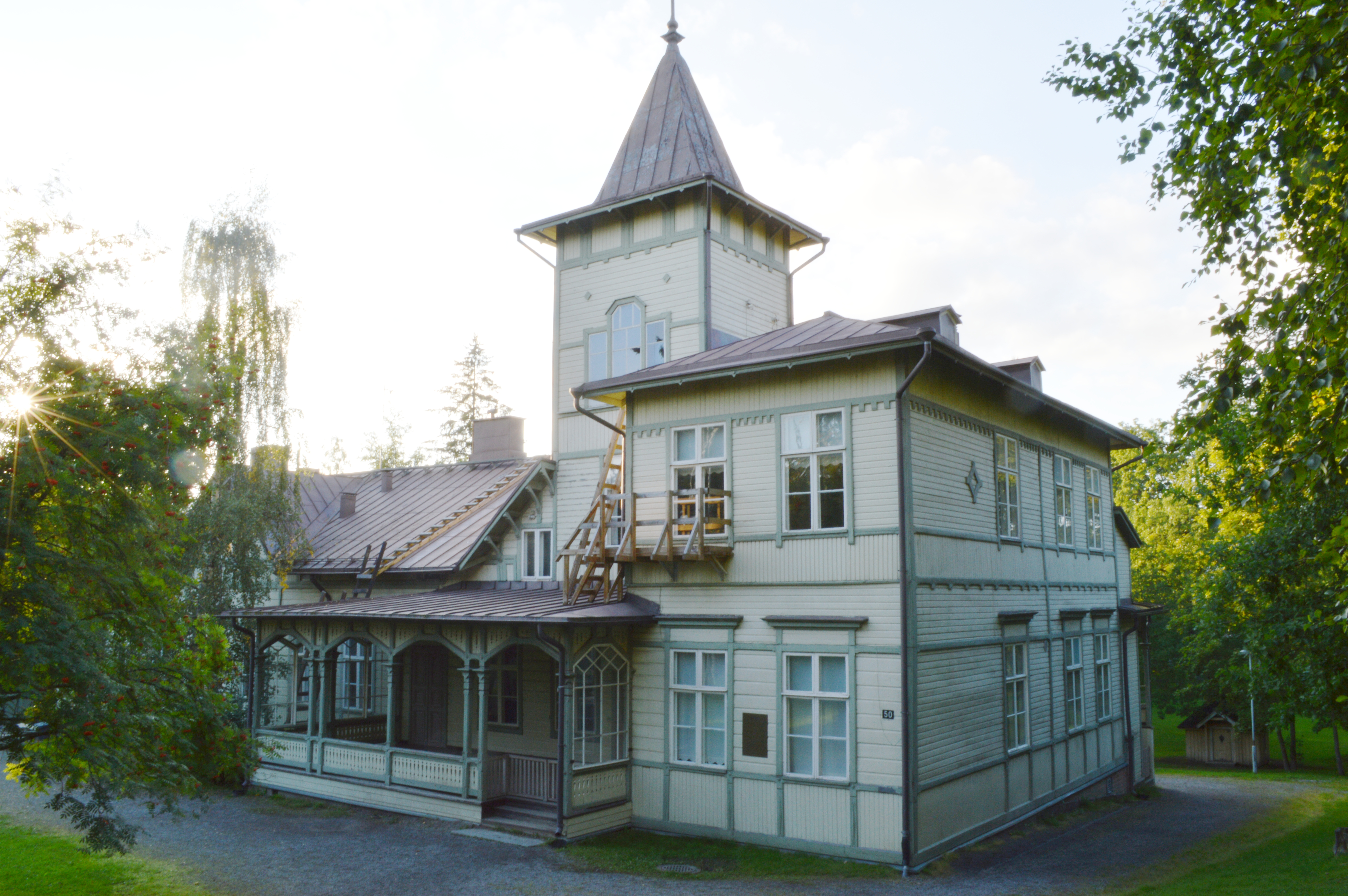 Lepolan huvila